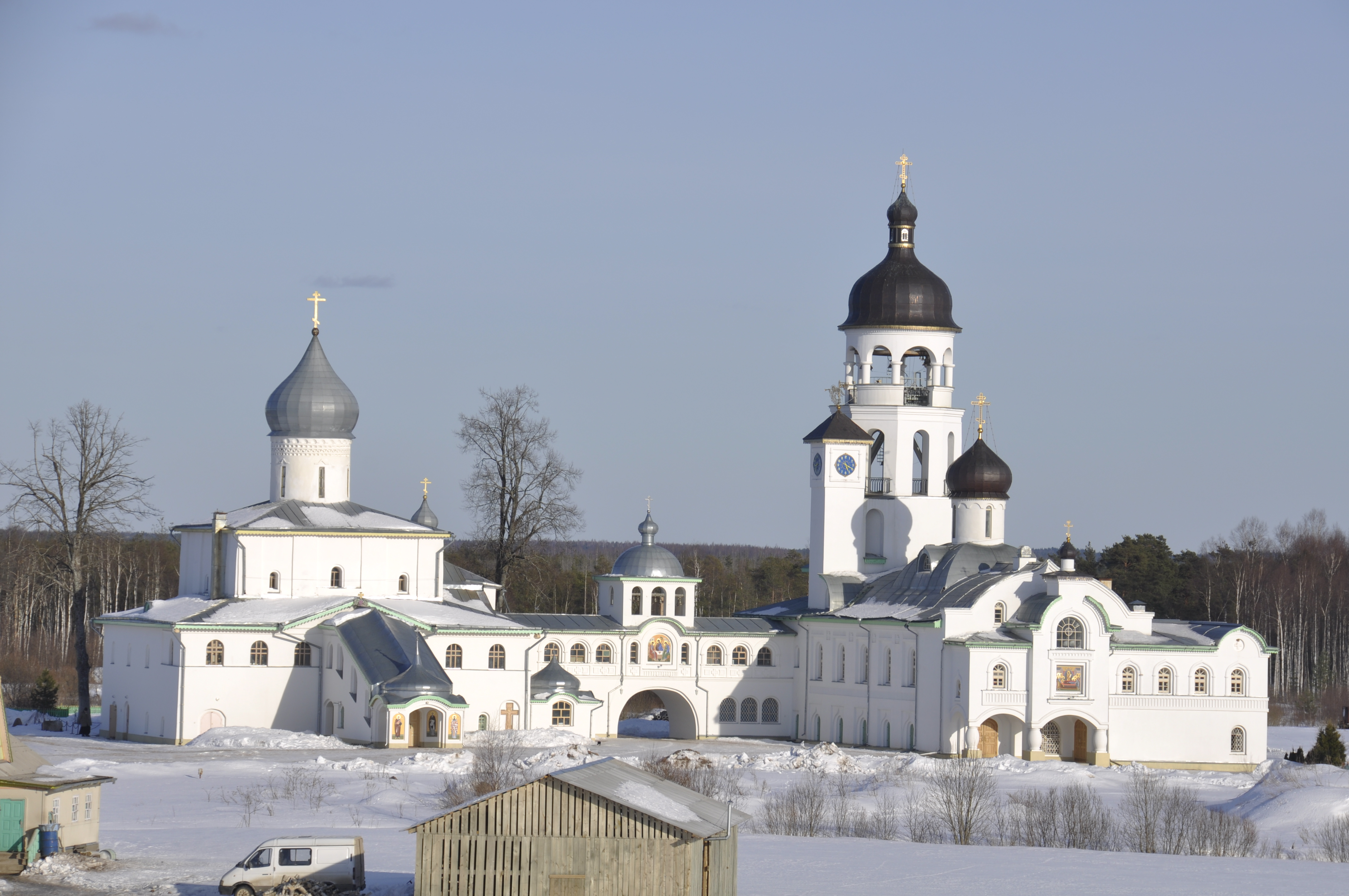 Наступила весна и Крыпецкий монастырь стал преображаться.Мардарий.